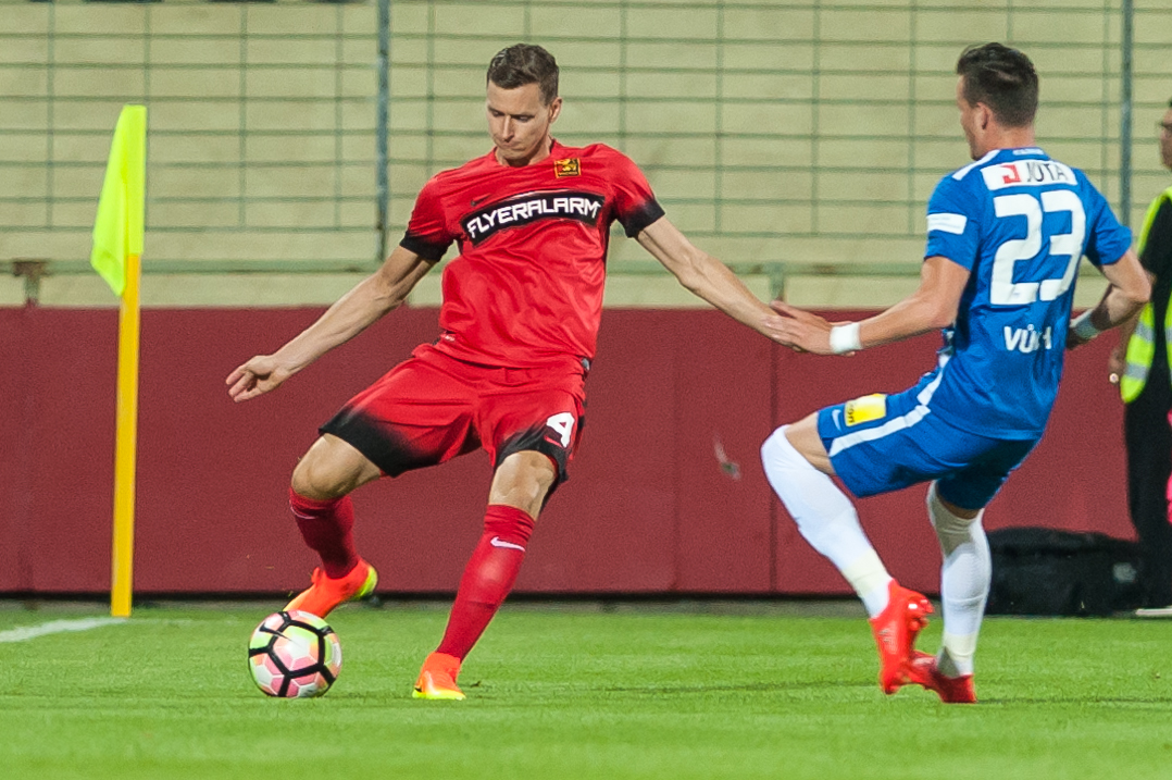 20160728 Europa League - FC Admira Wacker Moedling vs FC Slovan Liberec. Bild zeigt Stephan Zwierschitz (ADM) und Egon Vuch (FC Slovan Liberec).